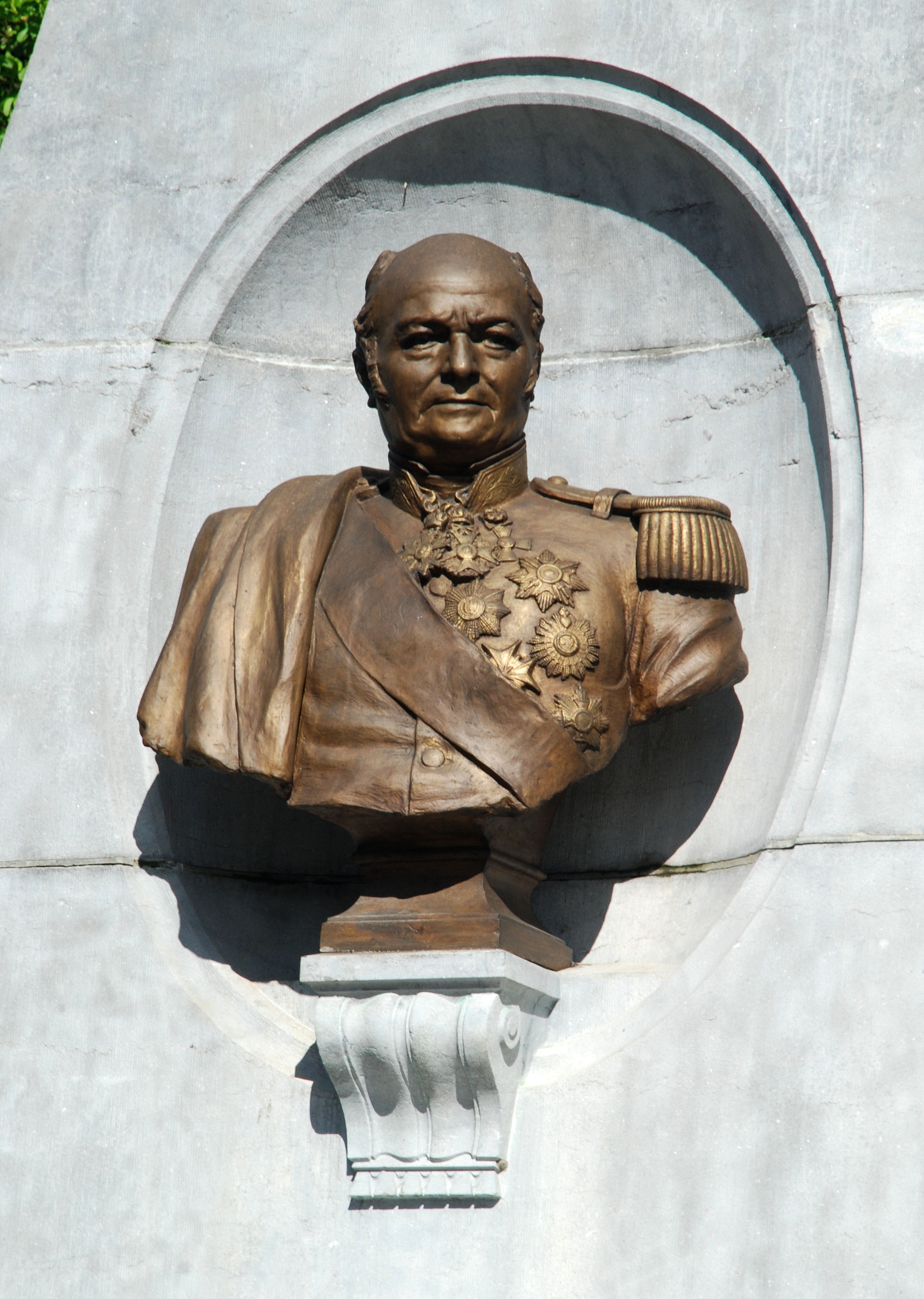 Belgique - Brabant wallon - Court-Saint-Etienne - Monument au comte Goblet d'Alviella